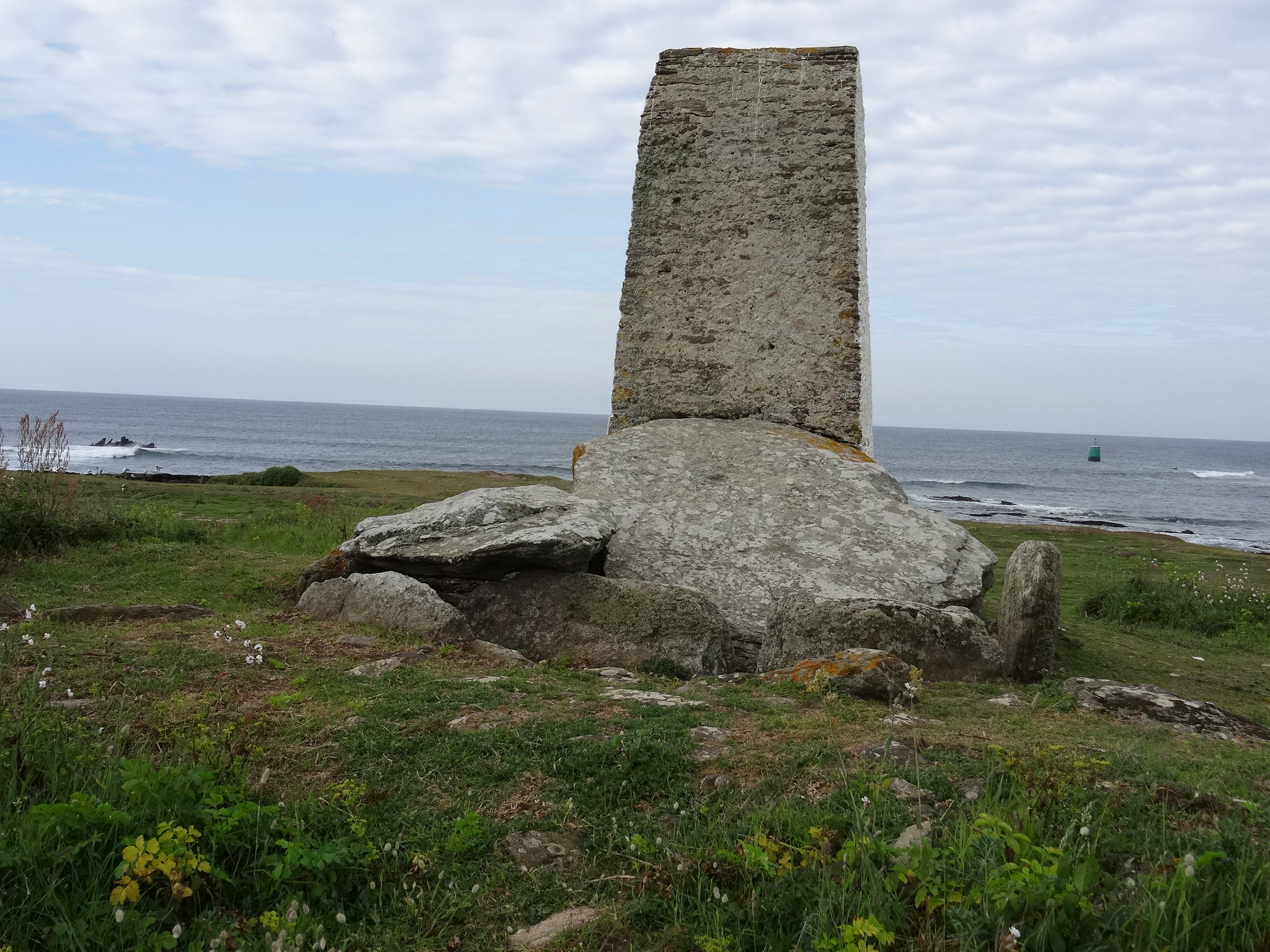 Île de Groix en mai 2016.